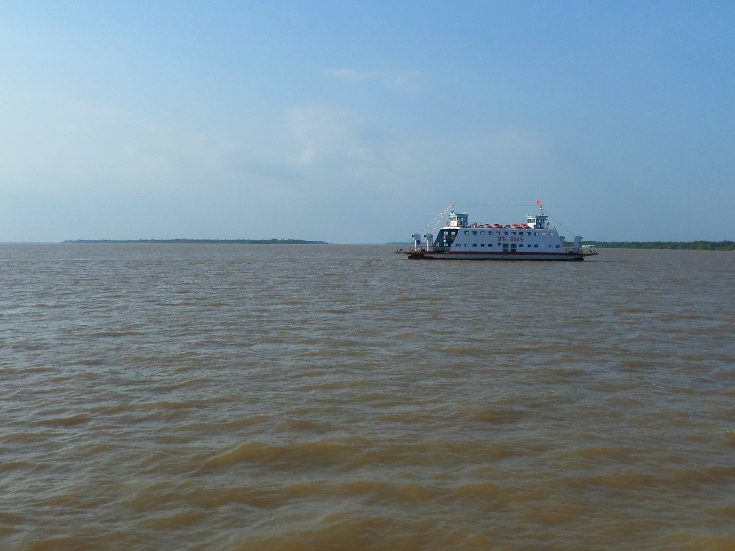 Thành Thới A, Mỏ Cày Nam, Bến Tre, Vietnam